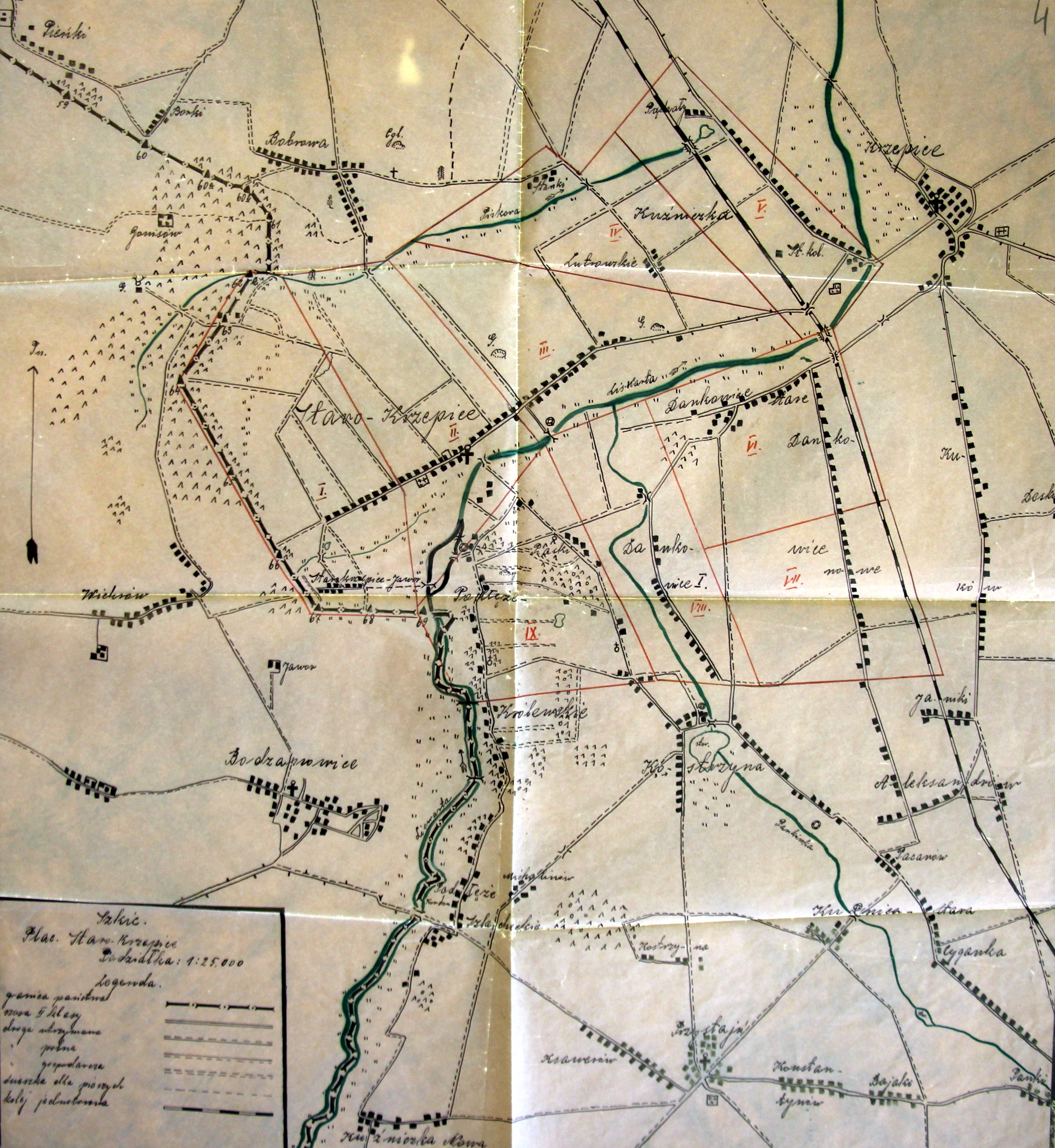 Szkic placówki SG Starokrzepice - lata 30. XX wieku